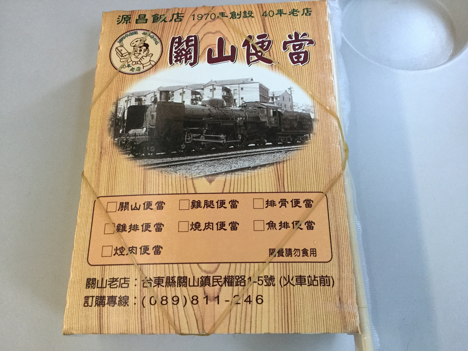 關山月台便當